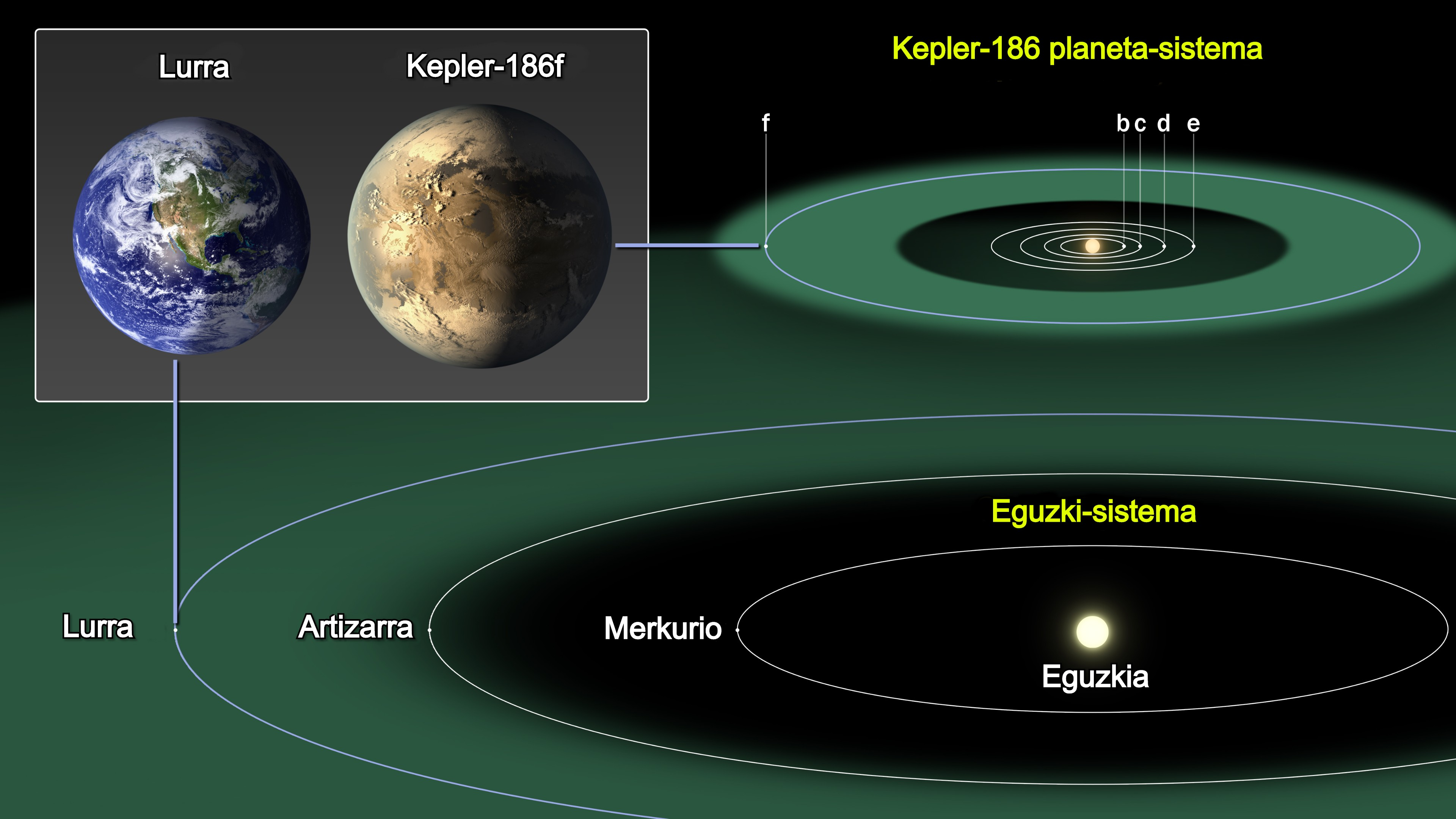 Kepler-186f planeta-sistema eta gure eguzki-sistema alderatzen dituen diagrama bat da. Bertan, gure planeta eta Kepler-186f exoplaneta bakoitzaren izarraren gune bizigarrian kokatzen direla erakusten da.